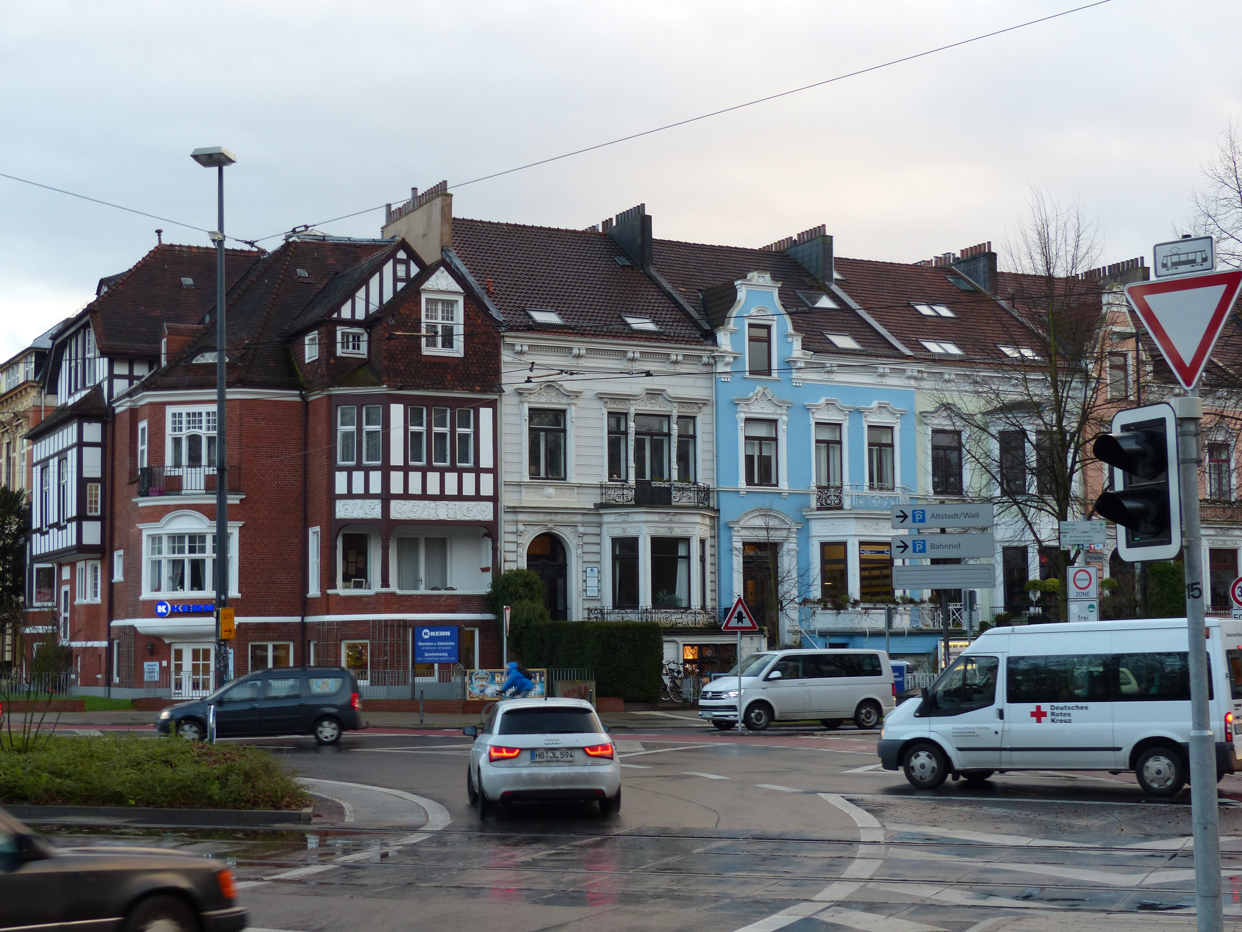 „Am Stern“ in Bremen: südliches Eckhaus Hollerallee/Parkallee und benachbarte Bremer Häuser auf der Ostseite der südlichen Parkallee